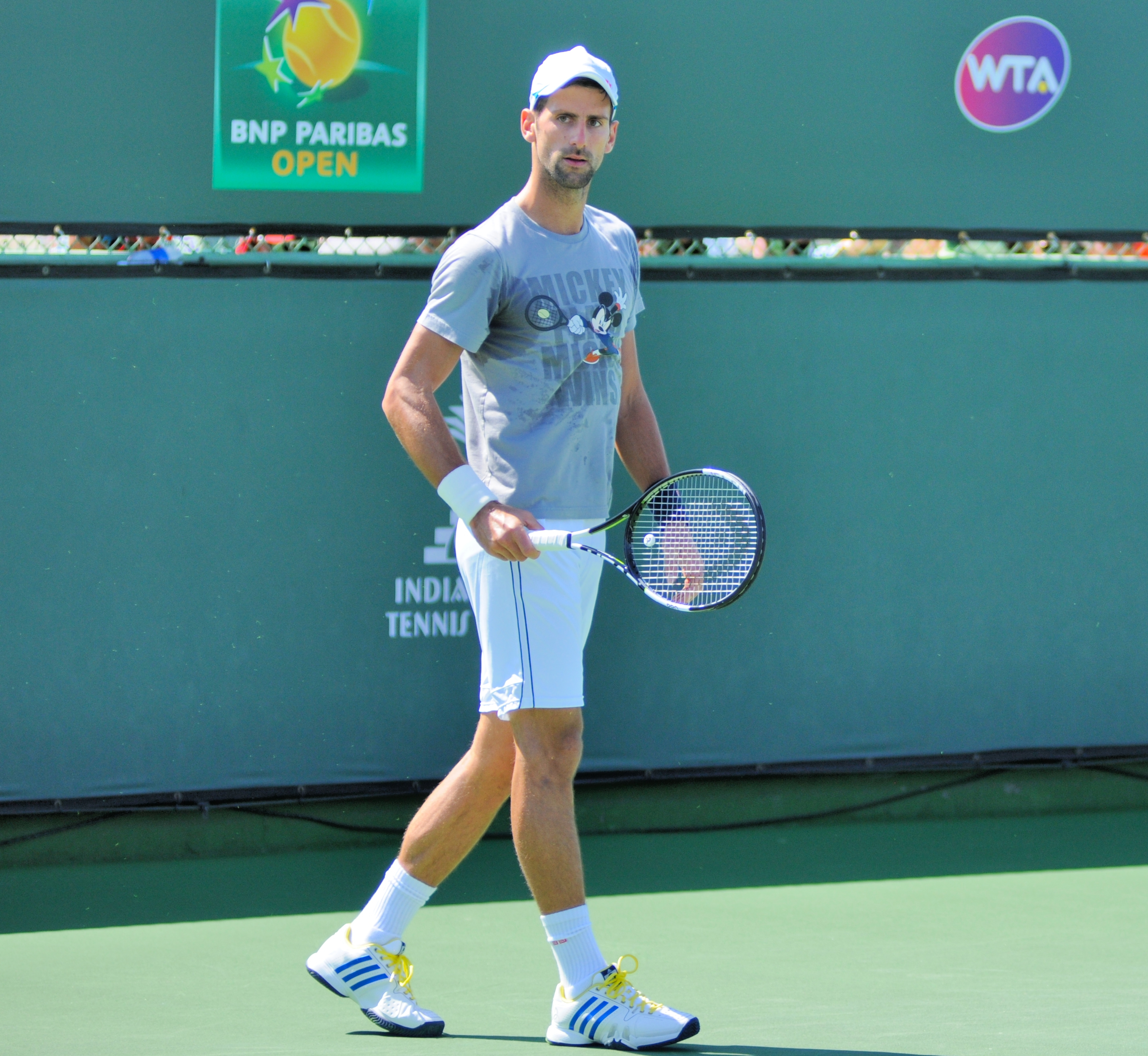 Novak Djokovic